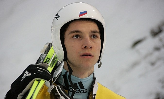 Aleksiej Romaszow podczas konkursu indywidualnego mężczyzn na skoczni normalnej w ramach Mistrzostw Świata 2013.